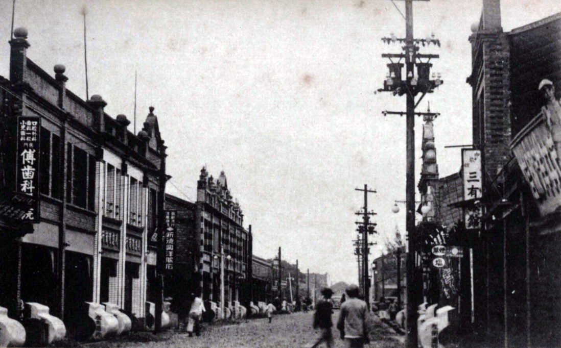 日治時期中壢街景